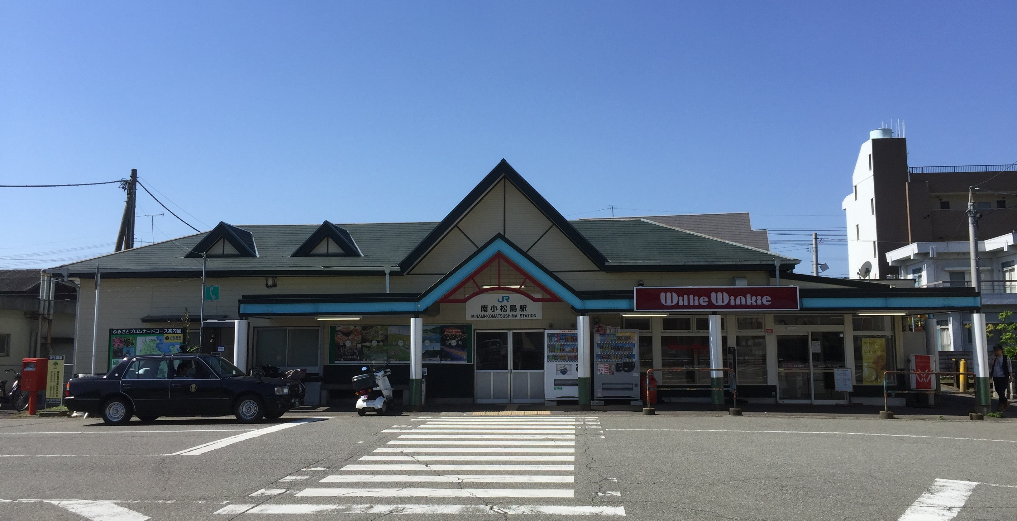 南小松島駅